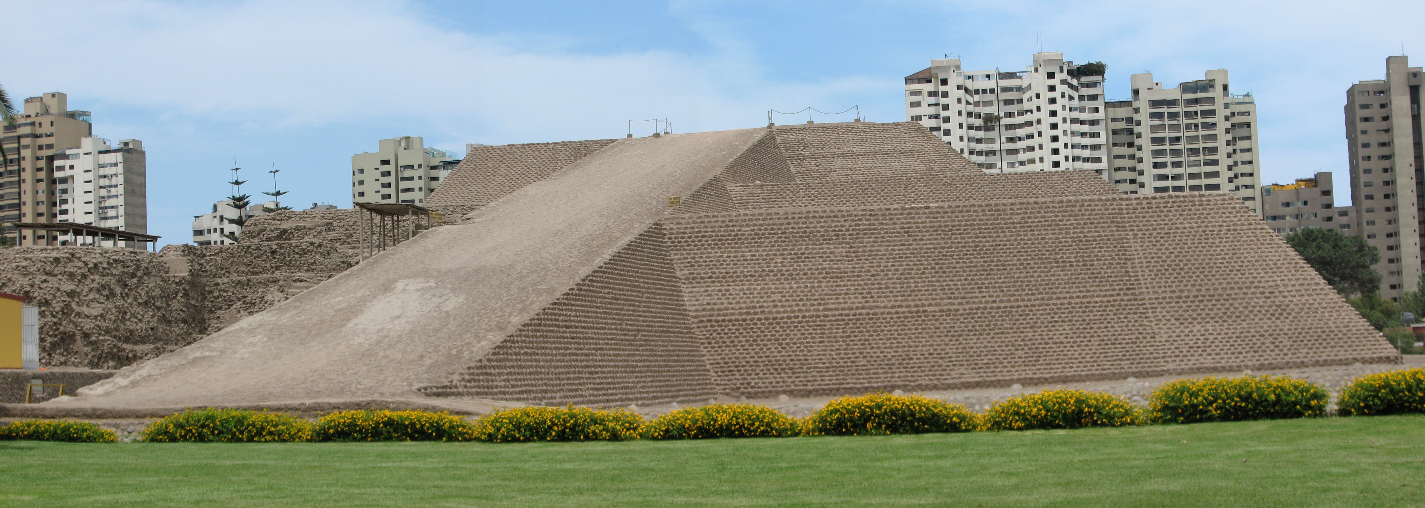 Huallamarca Archaeological site (pyramid)